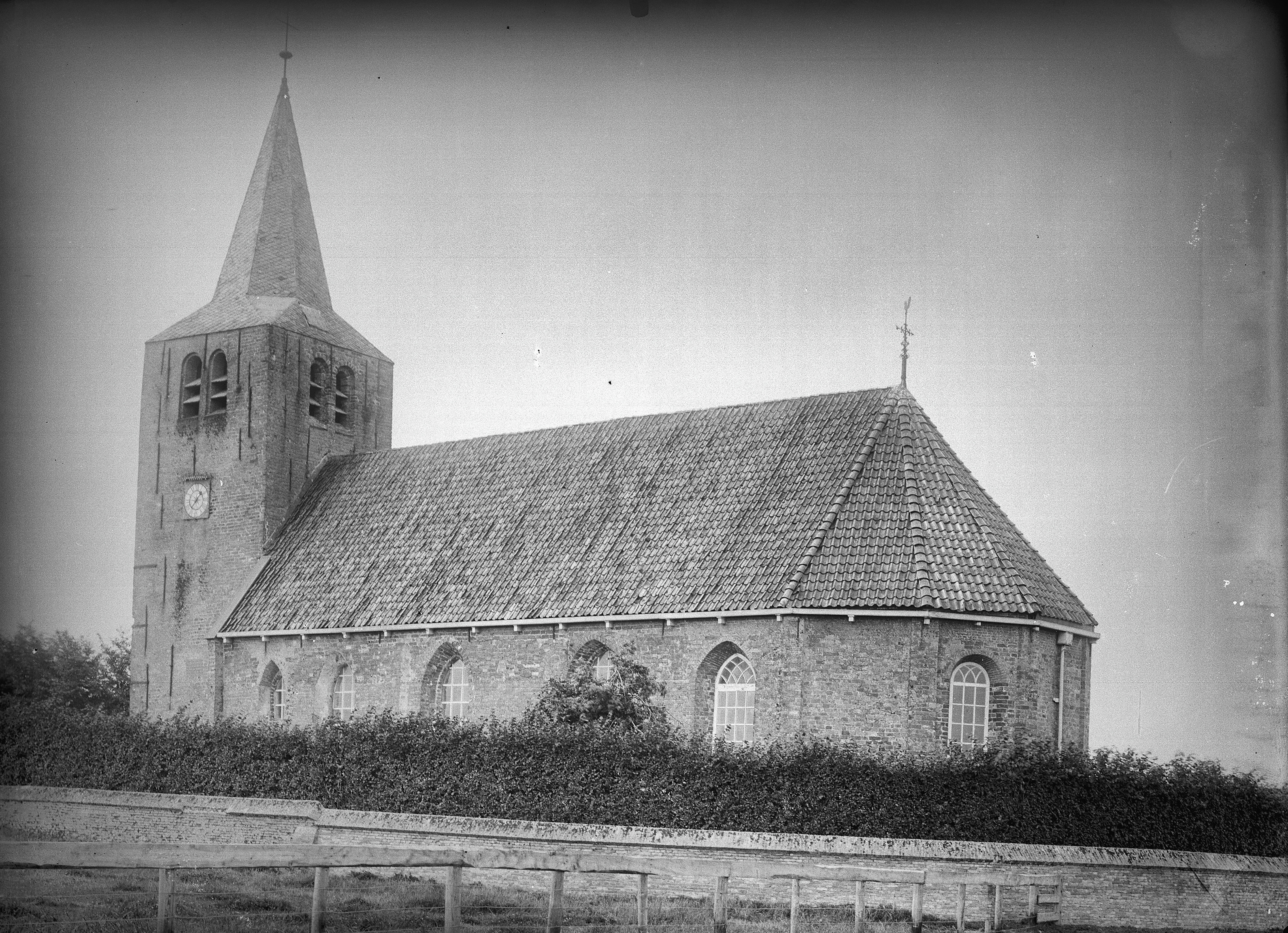 Nederlands Hervormde Kerk en Toren: kerk vanuit het zuid-oosten (opmerking: Fotonummer 6086)